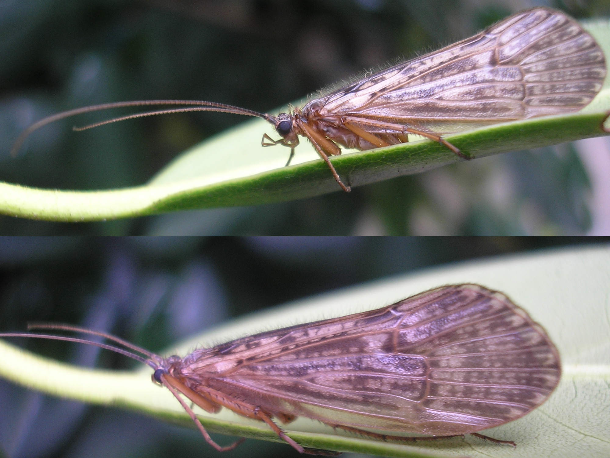 Some species of Caddisfly (Halesus cf. tesselatus) Location: Soderstorf (Lüneburger Heide), Germany Keywords: trichoptera, caddisfly --- nl: Eén of andere Schietmot Locatie: Soderstorf (Lüneburger Heide), Duitsland Trefwoorden: schietmot, kokerjuffer --- de: Irgendeine Art Köcherfliege